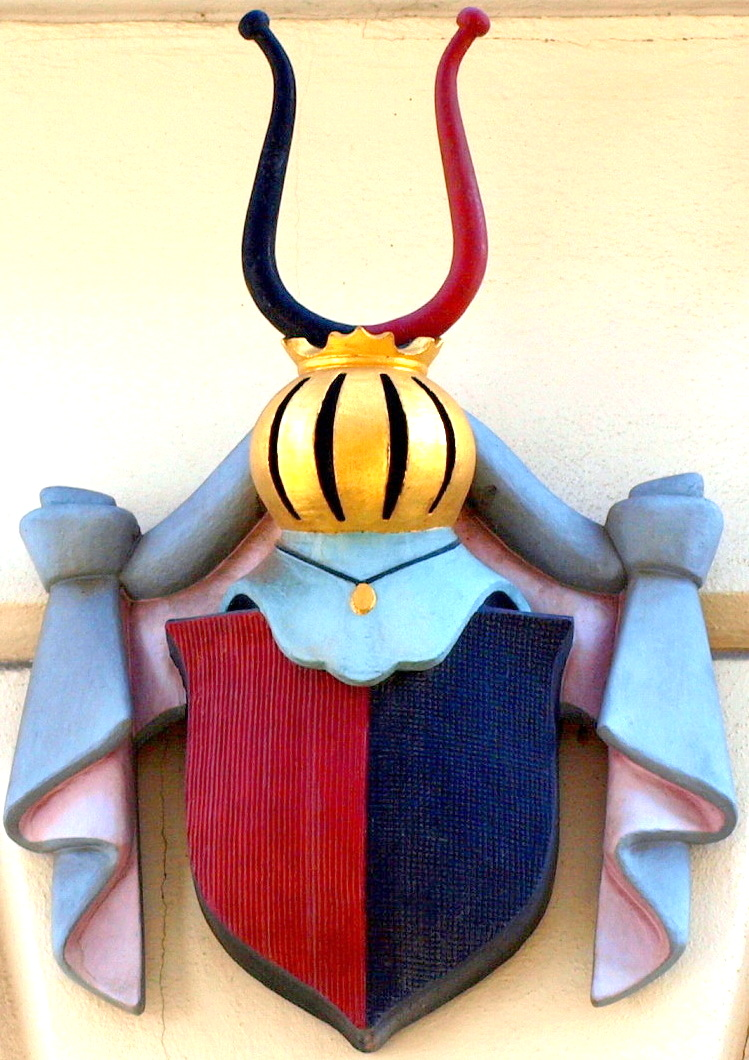 Vratislavský erb